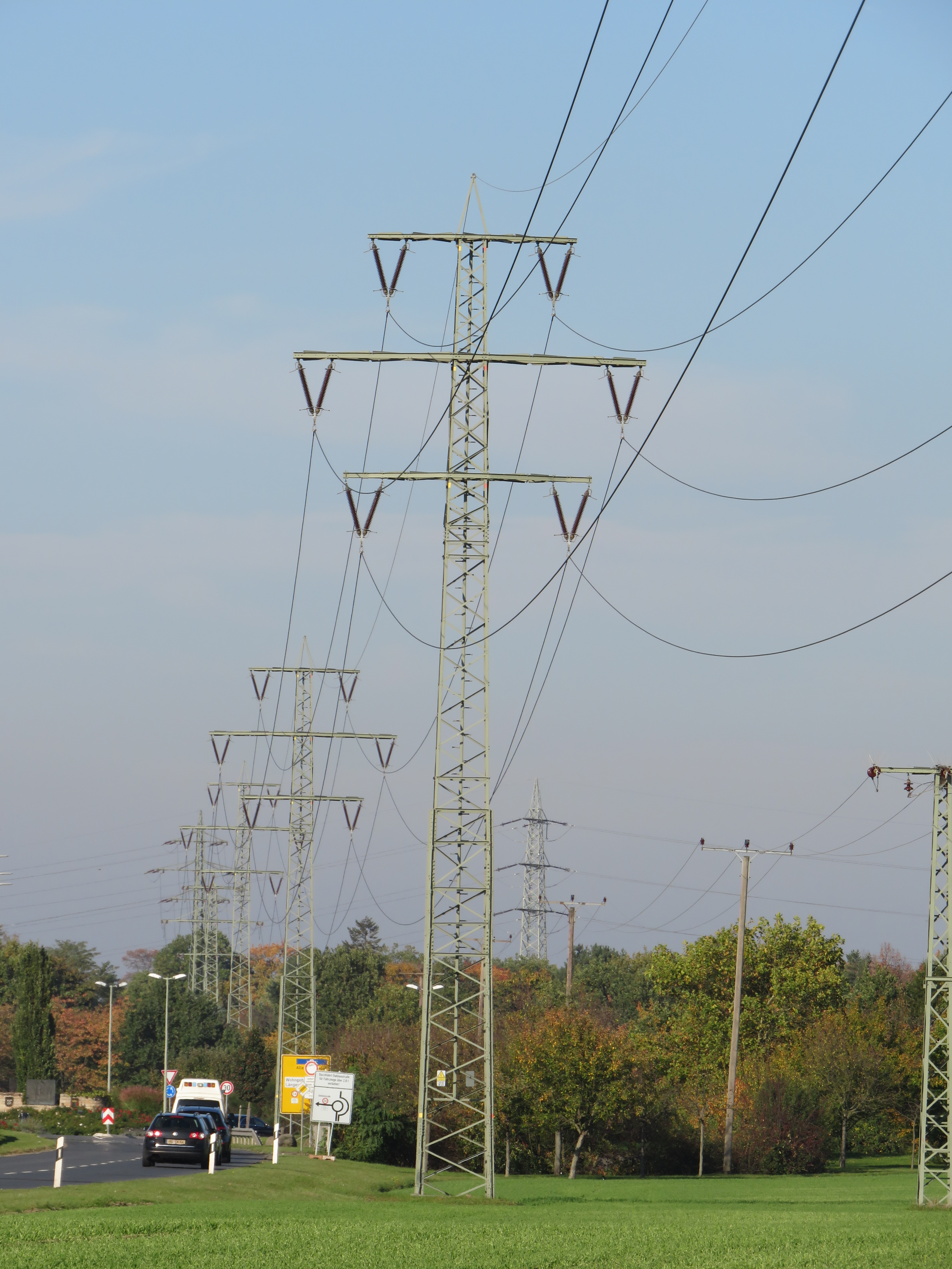 Ältere Tonnenmasten der 110-kV-Leitung zwischen Höchst und Kelsterbach (Bl. 3018)